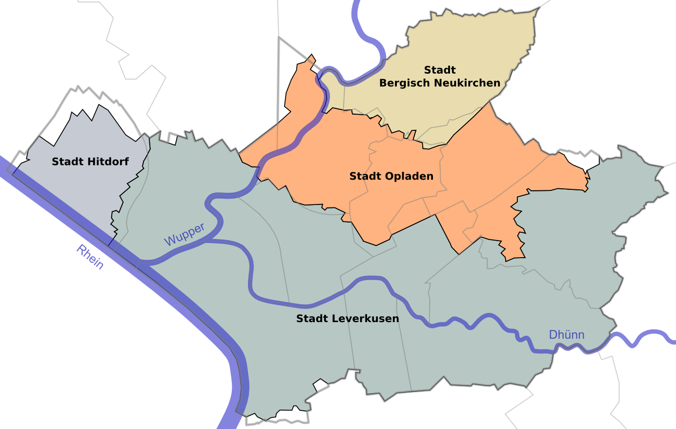 Karte des heutigen Leverkusener Gebiets nach 1930. Die heutigen Stadt- und Stadtteilgrenzen sind grau dargestellt.